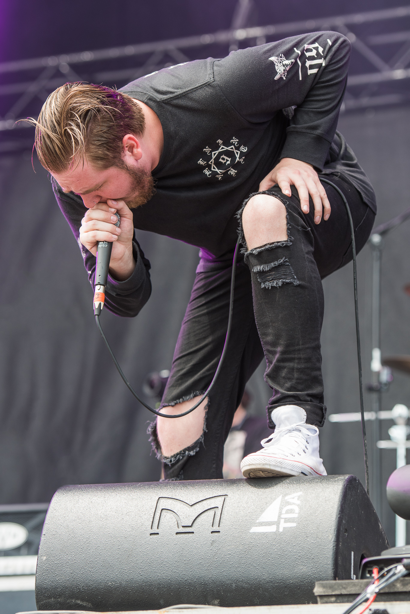 ARGO-Konzerte,Beck's Park Stage,Briton Bond,Festival,Konzert,Livekonzert,Livemusik,Musik,RiP,Rock im Park 2016,Wage War